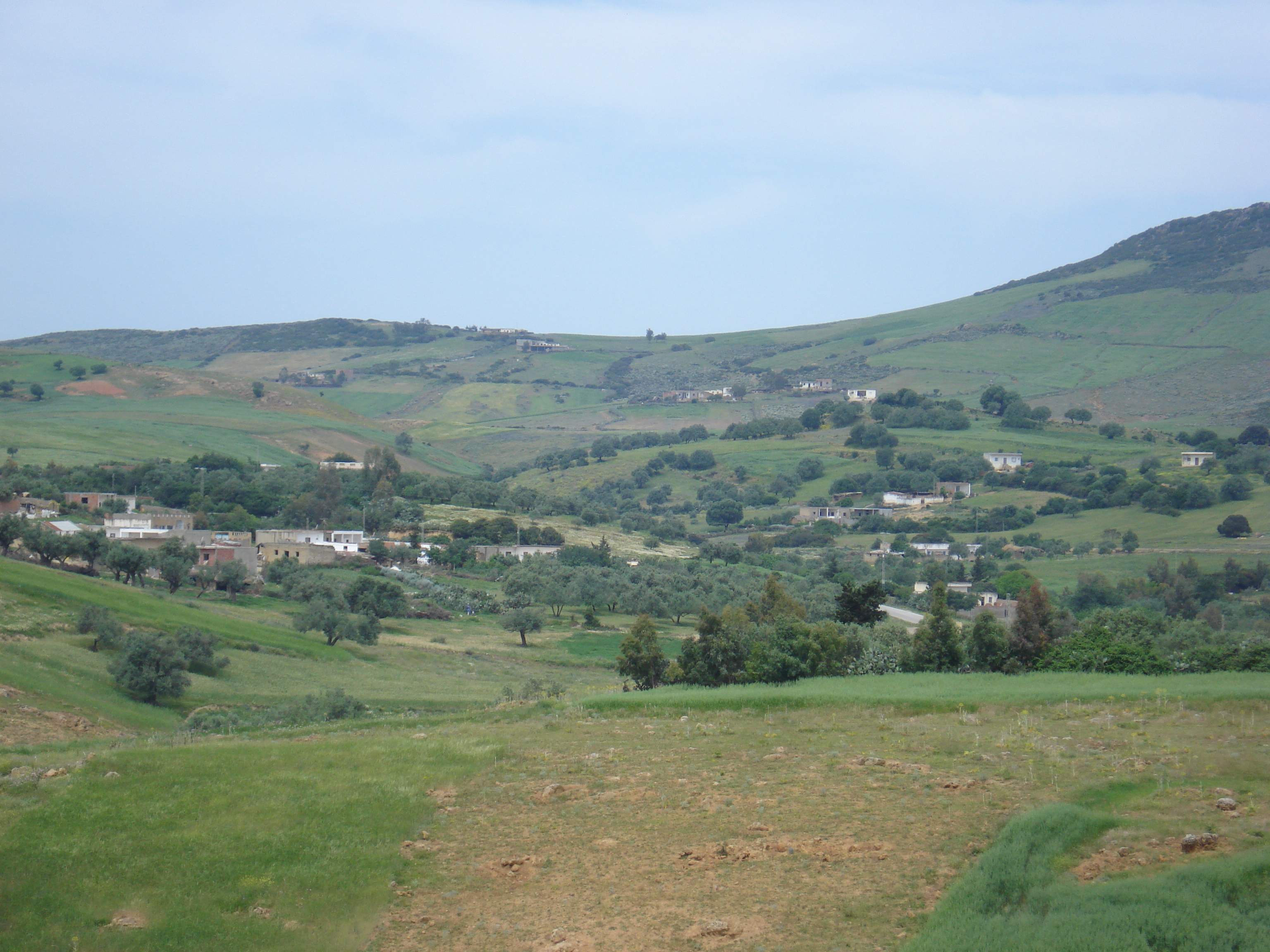 Village "Bou Jrir بوجرير" sur la Route Régionale n°58, Délégation de Sejnane, Gouvernerat de Bizerte, Tunisie